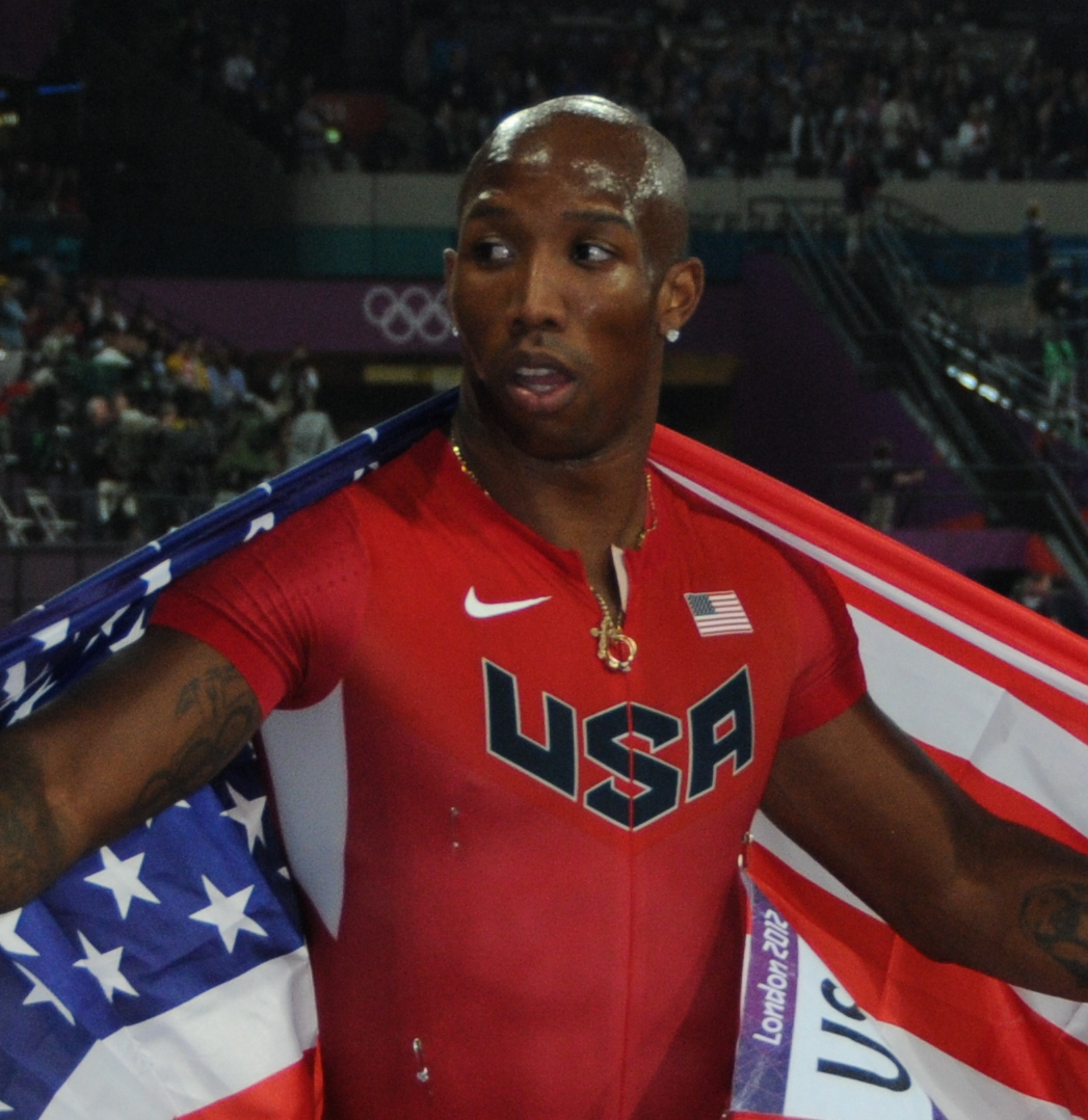 L'équipe USA du 4x100 médaillé d'argent aux JO de Londres